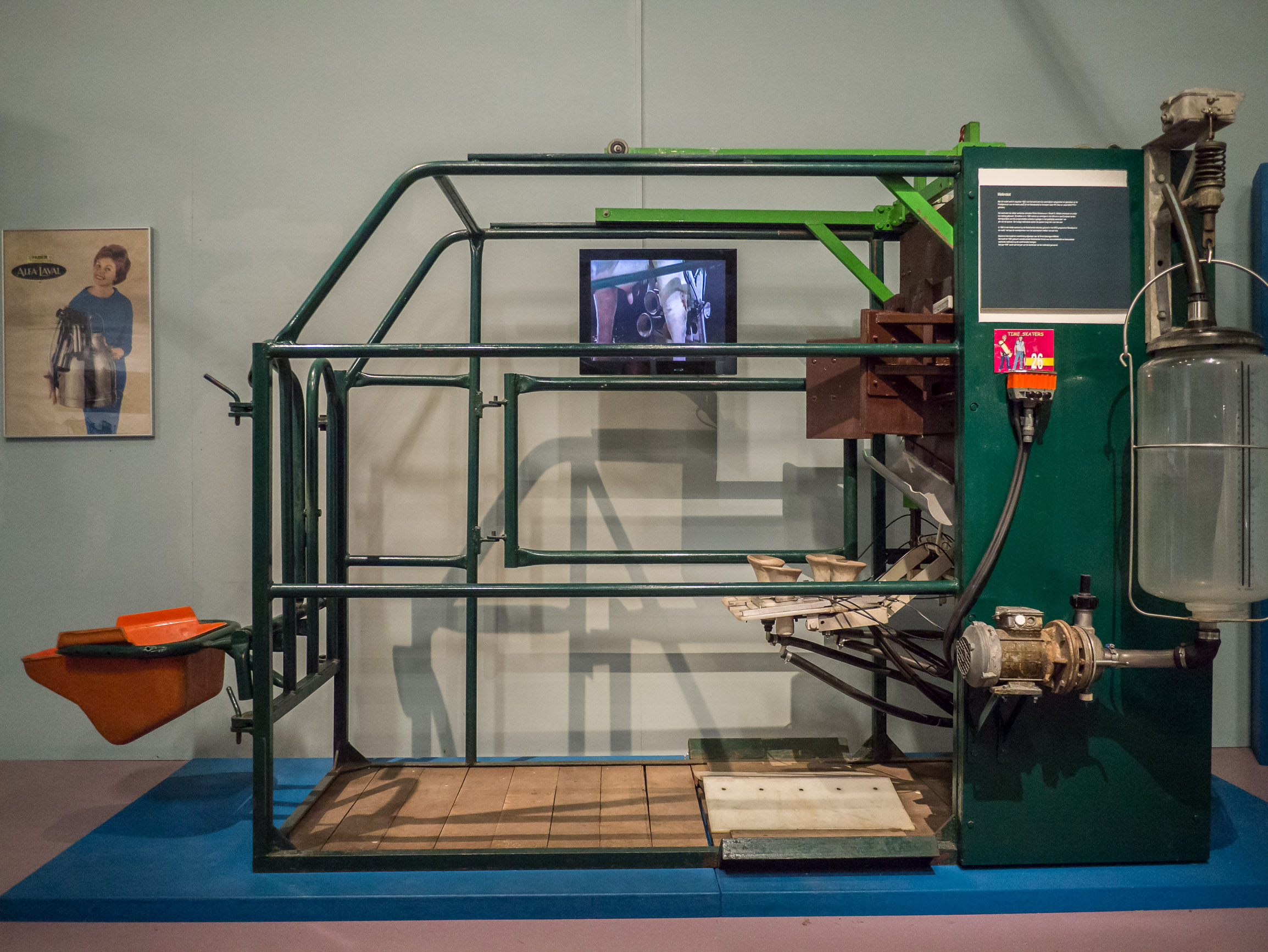 De volgende tekst staat op het info bordje. Met dit model werd in augustus 1983 voor het eerst een koe automatisch aangesloten en gemolken op de Praktijkschool voor de Veehouderij en het Weidebedrijf in Oentjerk (later IPC Dier en vanaf 2002 PTC+ geheten) Het werd door de aldaar werkende uitvinders Rinkje Oenema en ir. Roelof G. Middel ontworpen en onder hun leiding gebouwd. Zij hebben er in 1985 octrooi op verkregen in de USA en in zes Europese landen. Het bijzondere van het oorspronkelijke ontwerp is gelegen in het gelijktijdig aansluiten van alle vier de spenen. De huidige melkrobots sluiten de spenen (nog) een voor een aan. In 1994 is het model ter ontwikkeling afgestaan aan de firma Gascoigne-Melotte. Het heeft tot 1995 geduurd voordat enkele Nederlandse firma's een doorontwikkelde en betrouwbaar werkende melkrobot op de markt konden brengen. Het jaar 1997 wordt wel het jaar van de doorbraak van de melkrobot genoemd.